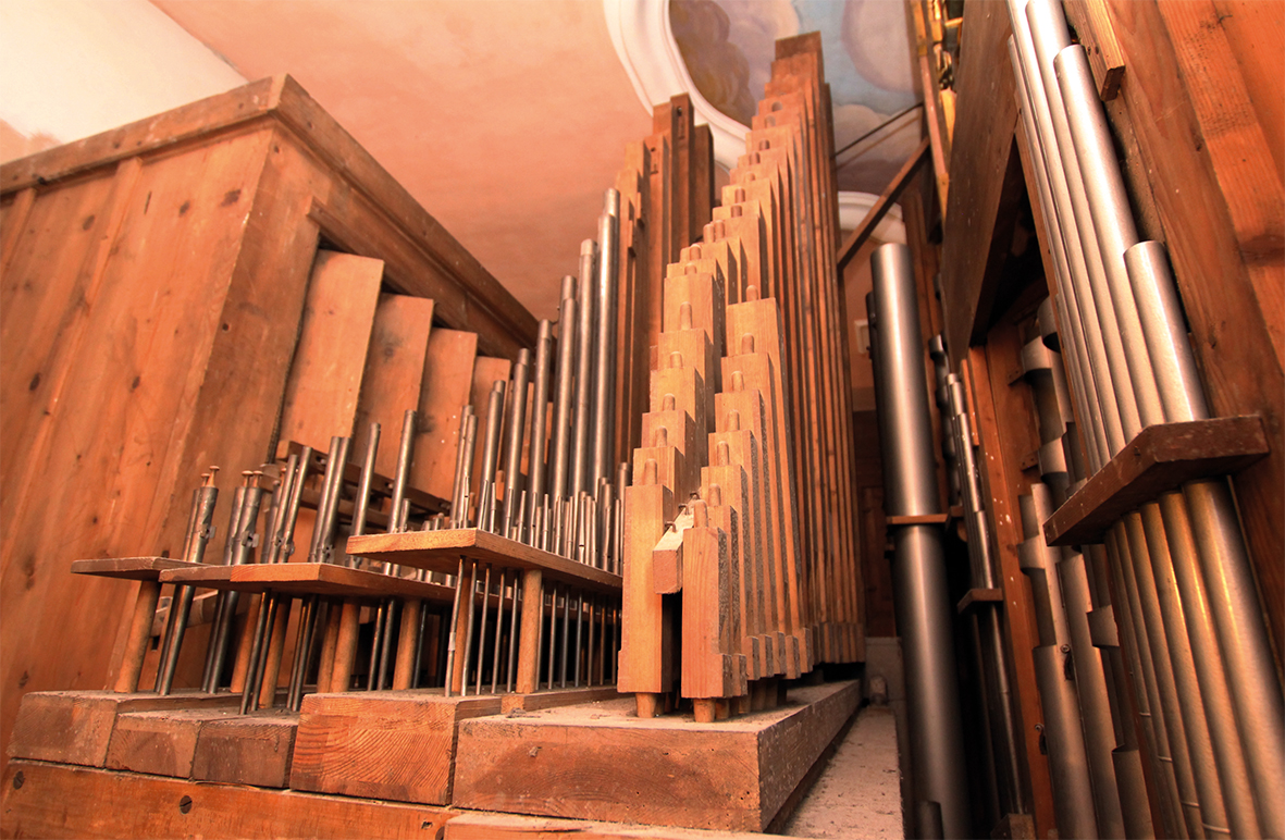 Pfeifen auf der oberen Windlade der Strebel-Orgel in St. Michael zu Stadtsteinach (Links im Hintergrund: Schwellwerk). Das Foto dokumentiert den Zustand 2017.